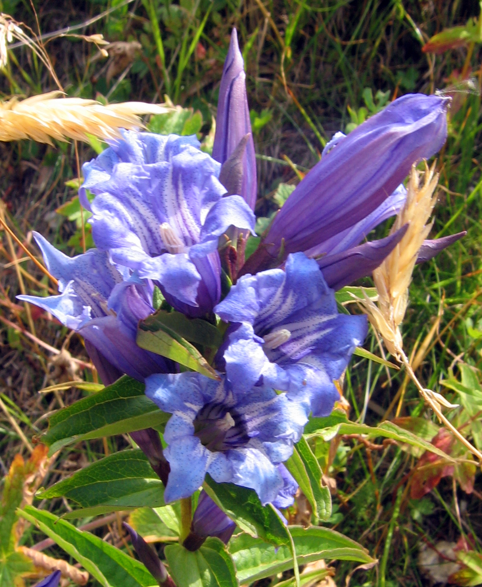 Gencijana sa Biogradske gore